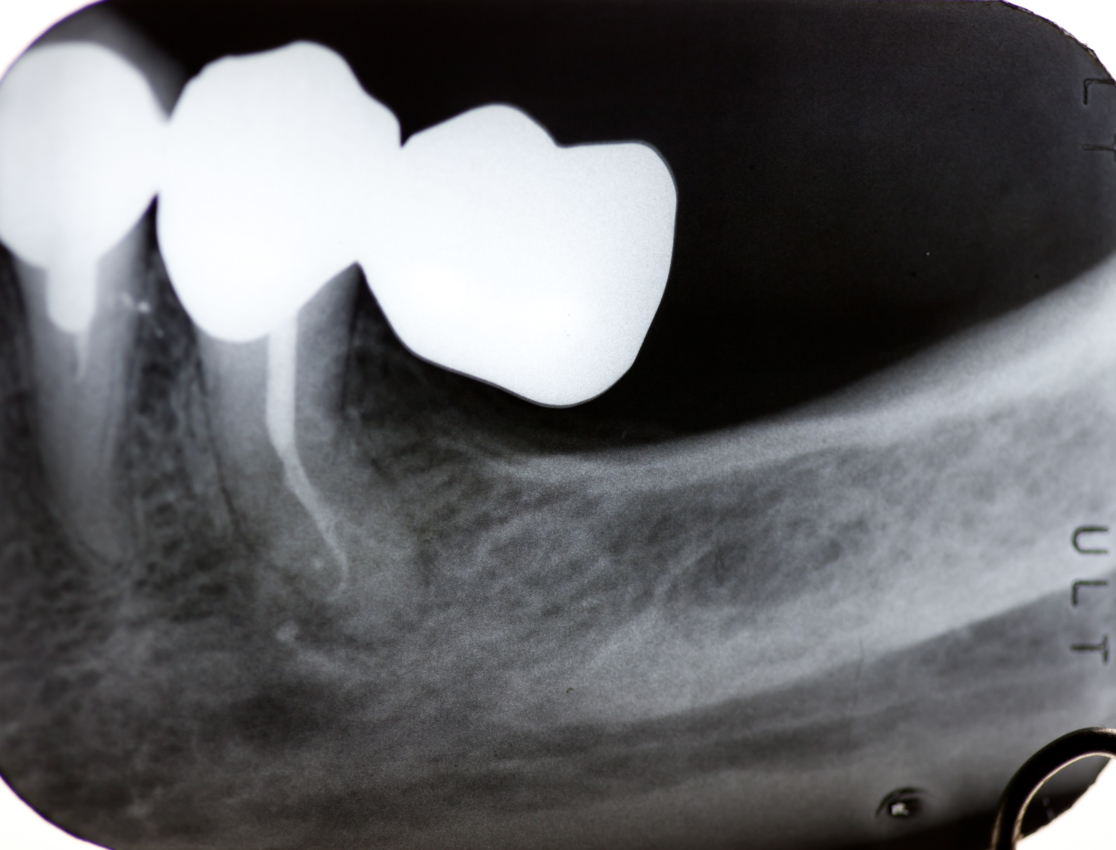 Röntgenbild Zahn